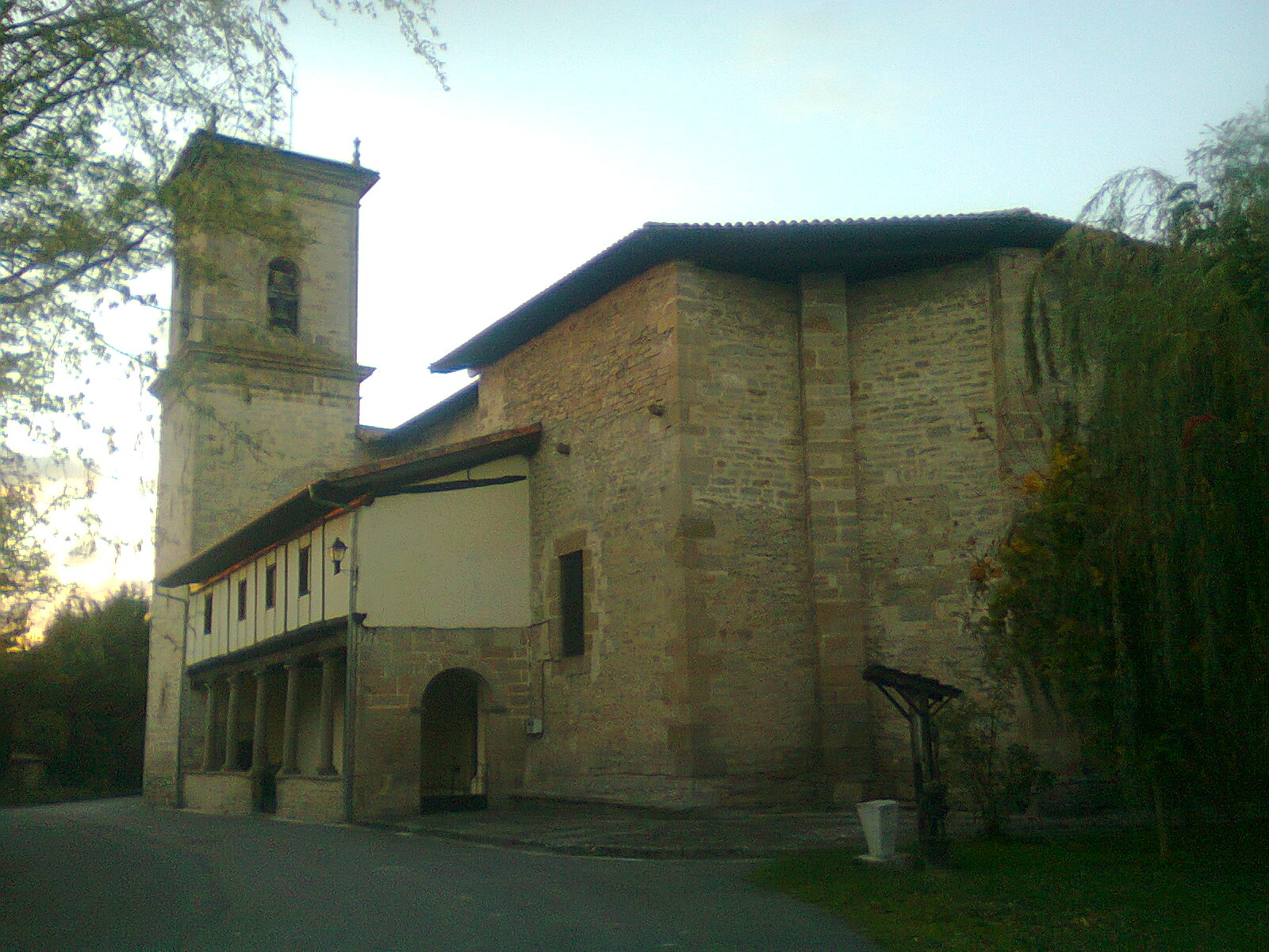 Iglesia de Junguitu (Álava, España)